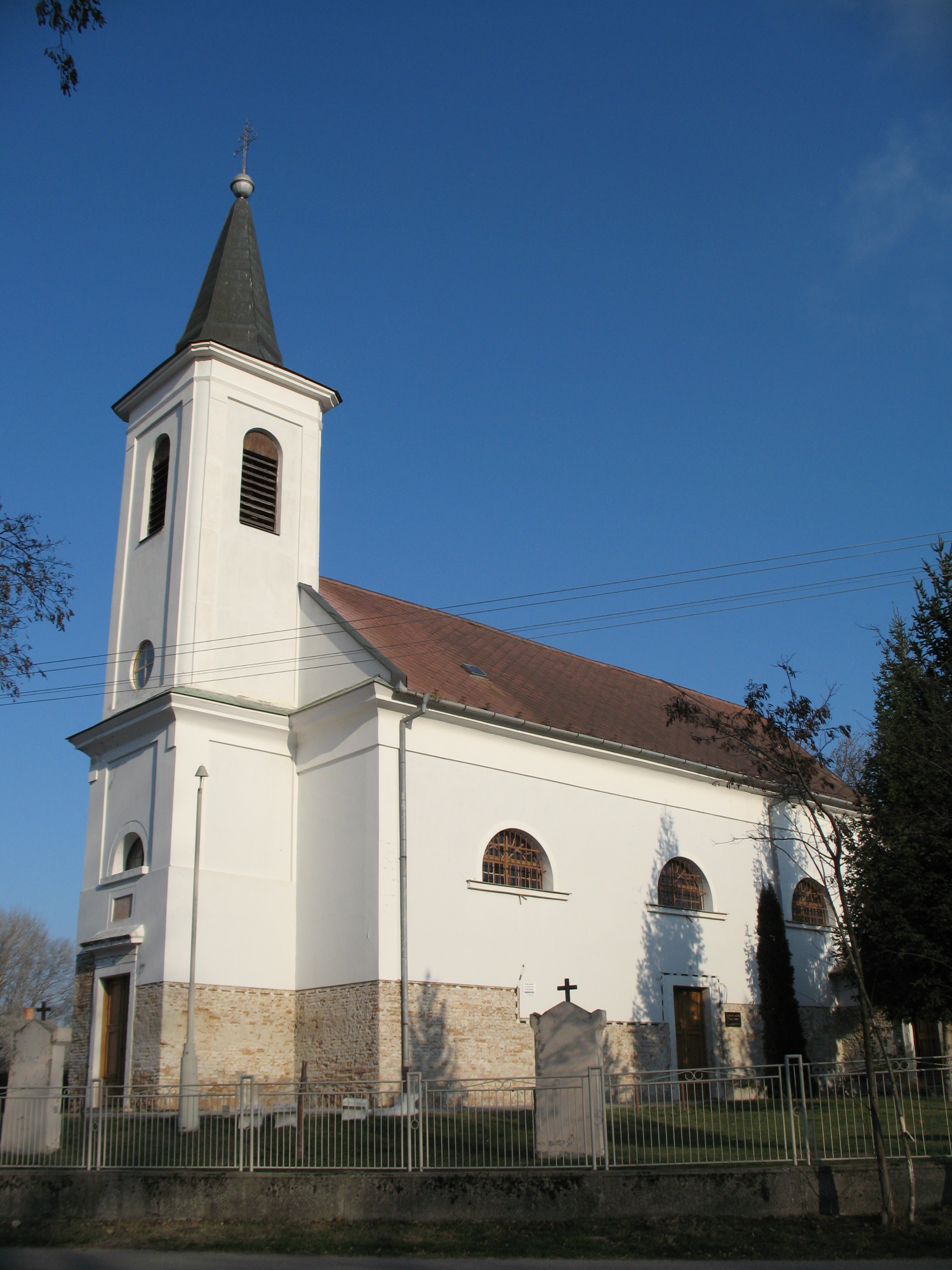 Balony